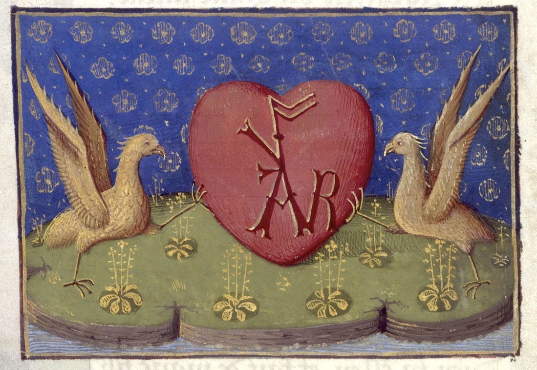 Heures de Charles VIII fol. 112V Blason de Antoine Vérard